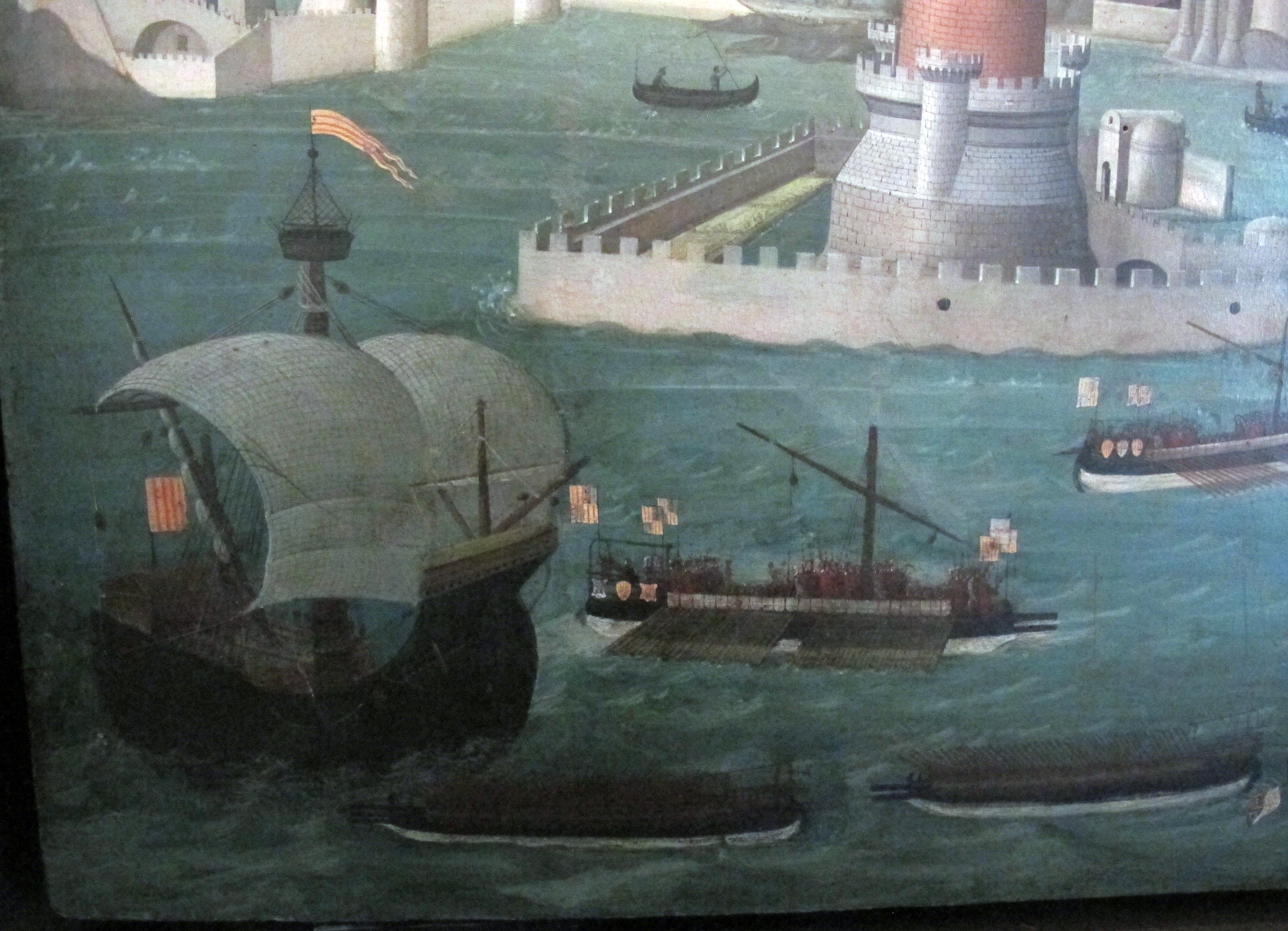 Museo di San Martino (Napoli)